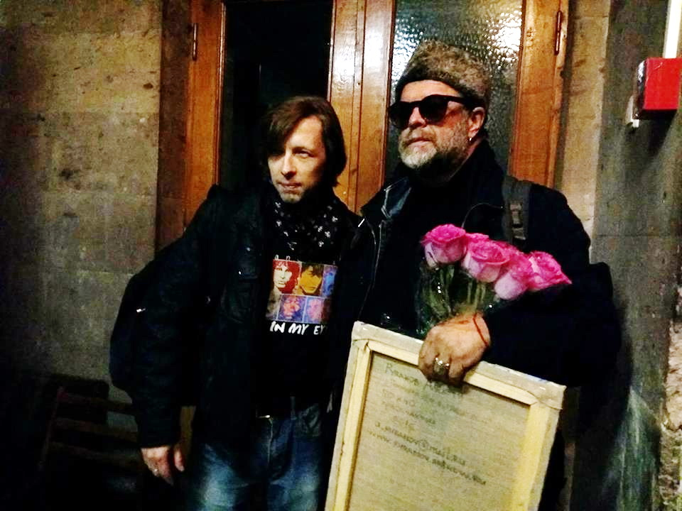 Картина кременчугского художника появится в коллекции Бориса Гребенщикова. 2016.Кременчуг.